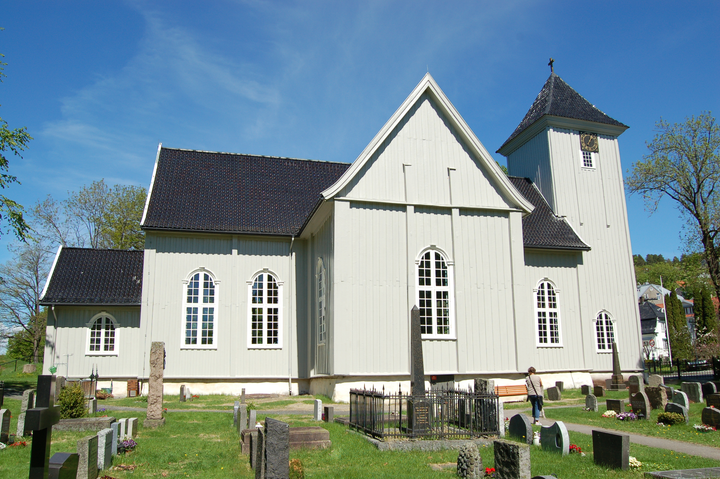 Drøbak kirke